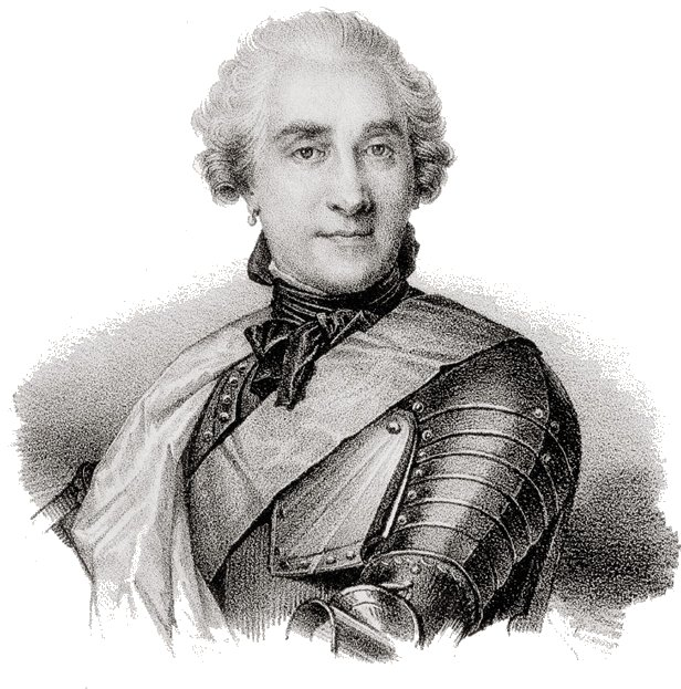 Portrait of Maurice de Saxe